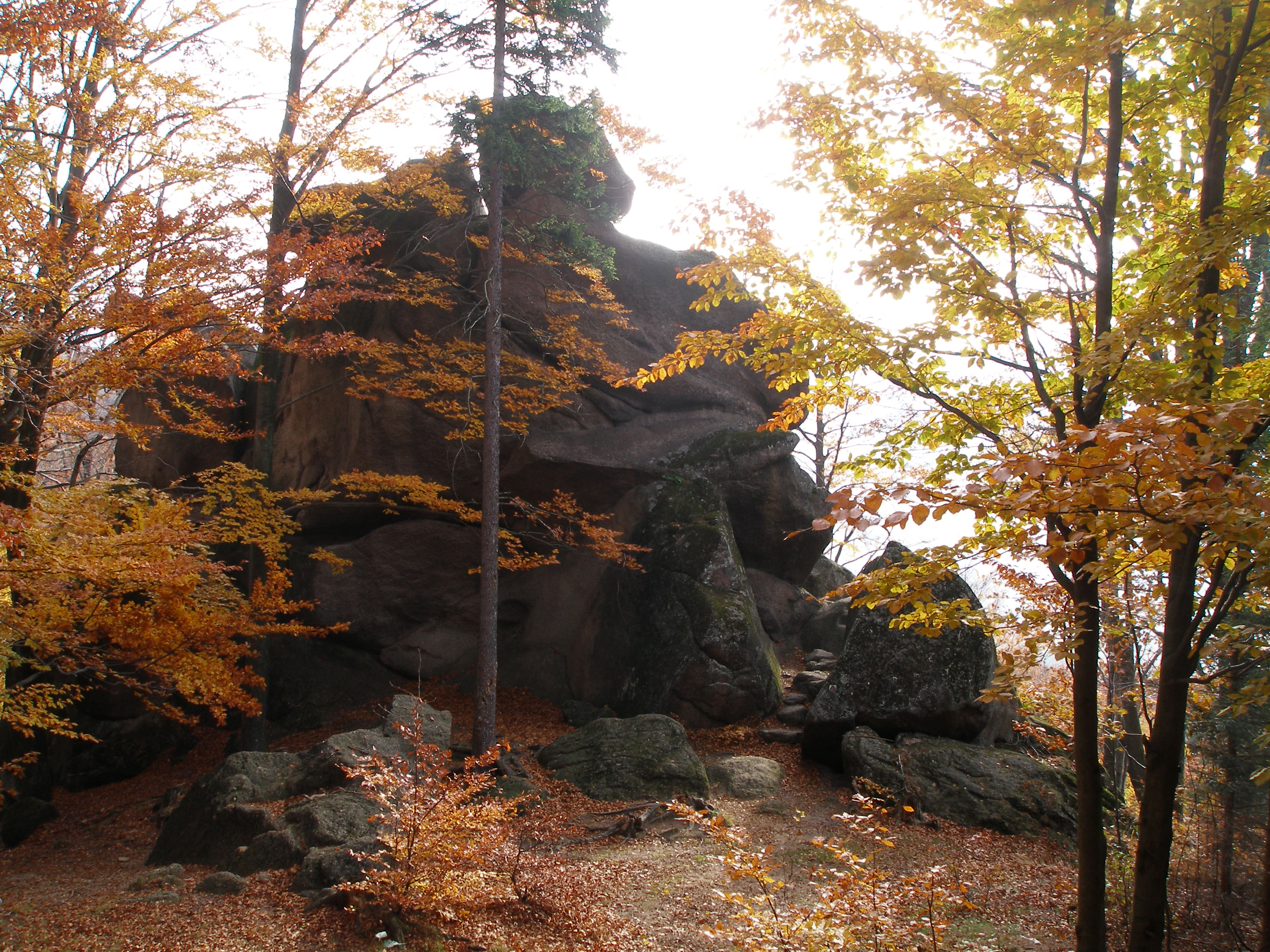 Skalka Kočičí kameny u chaty Hubertka.